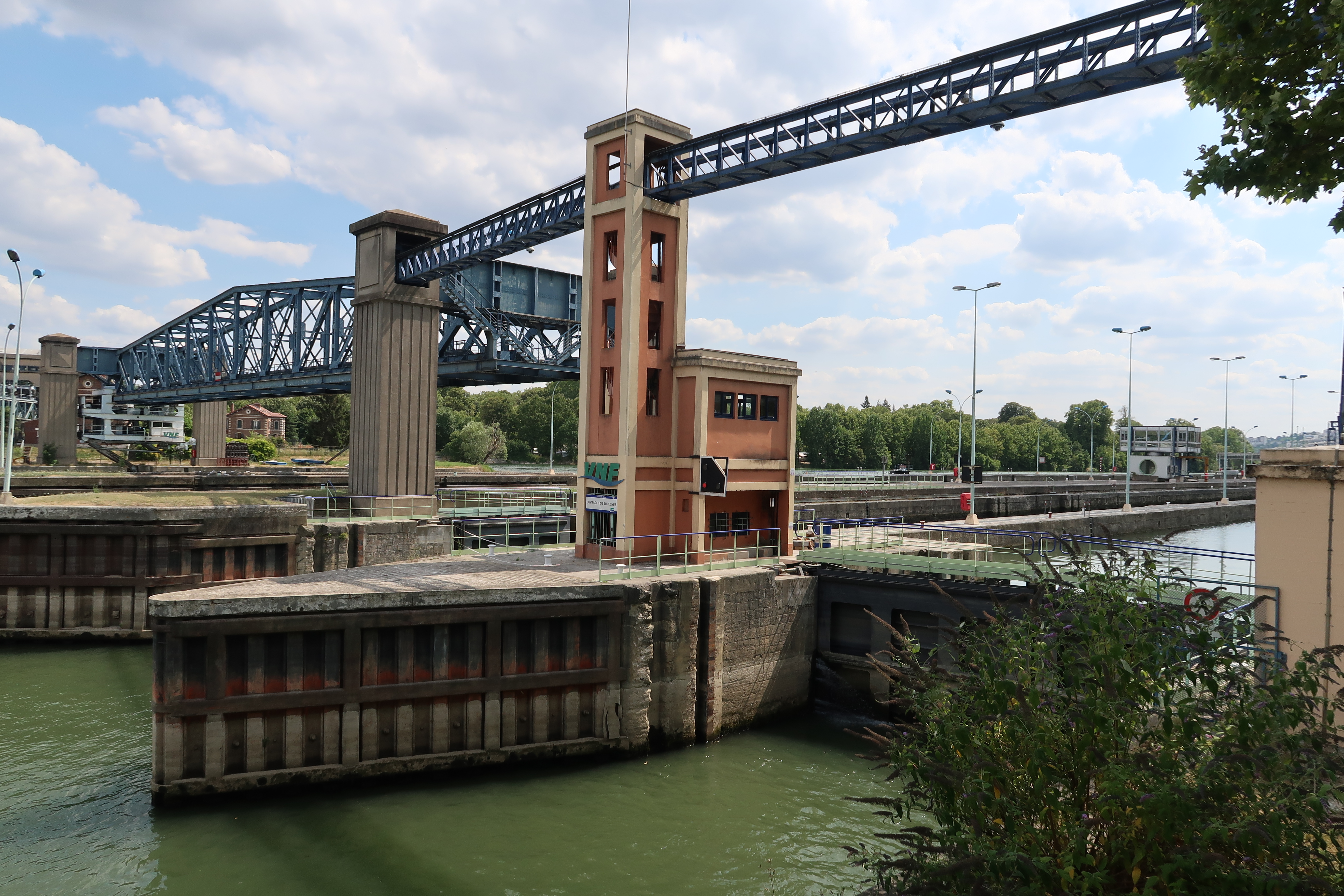 Écluse de Suresnes (Hauts-de-Seine).